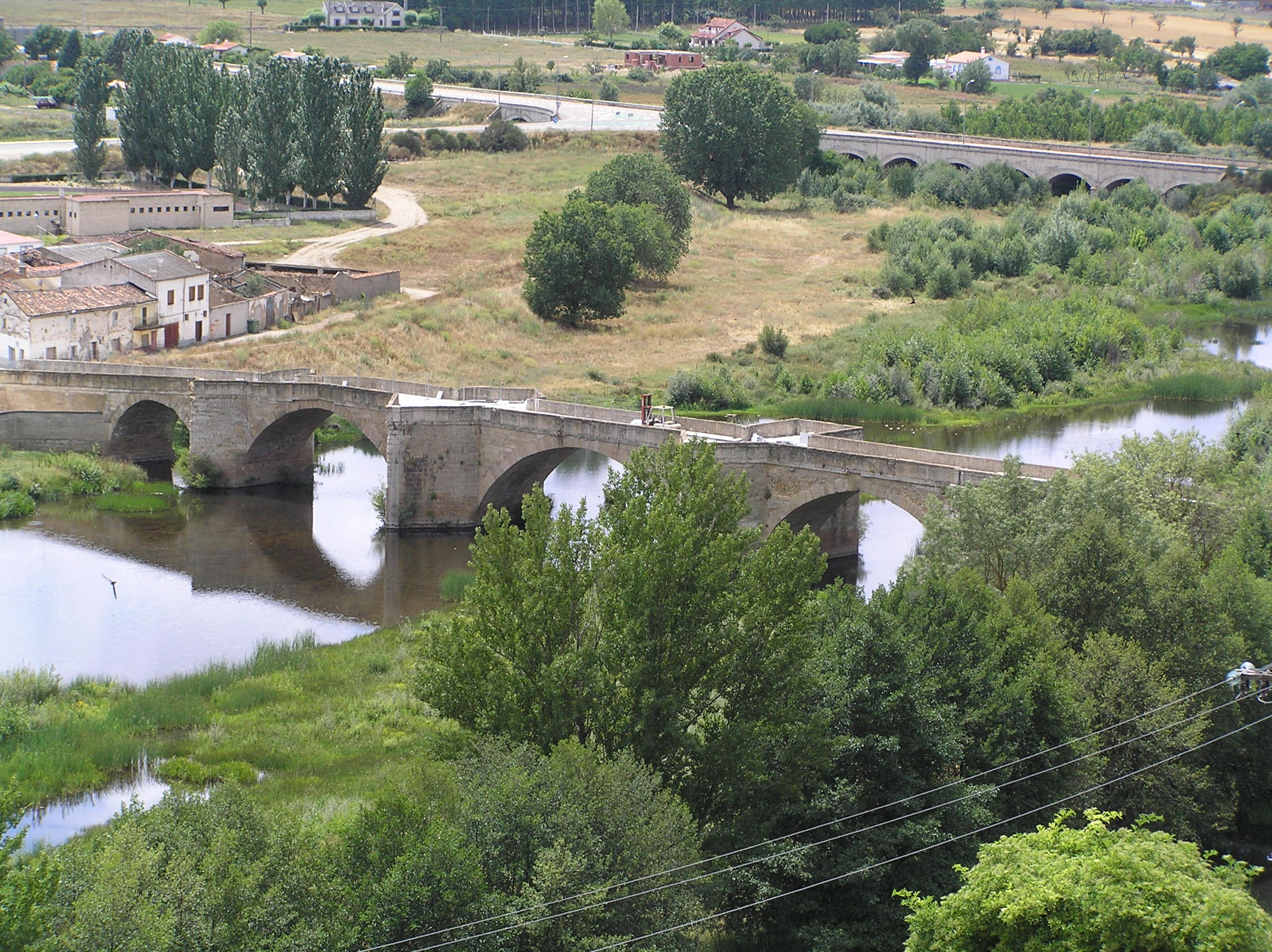 Puente antiguo sobre el río Águeda. Ciudad Rodrigo (provincia de Salamanca, España)